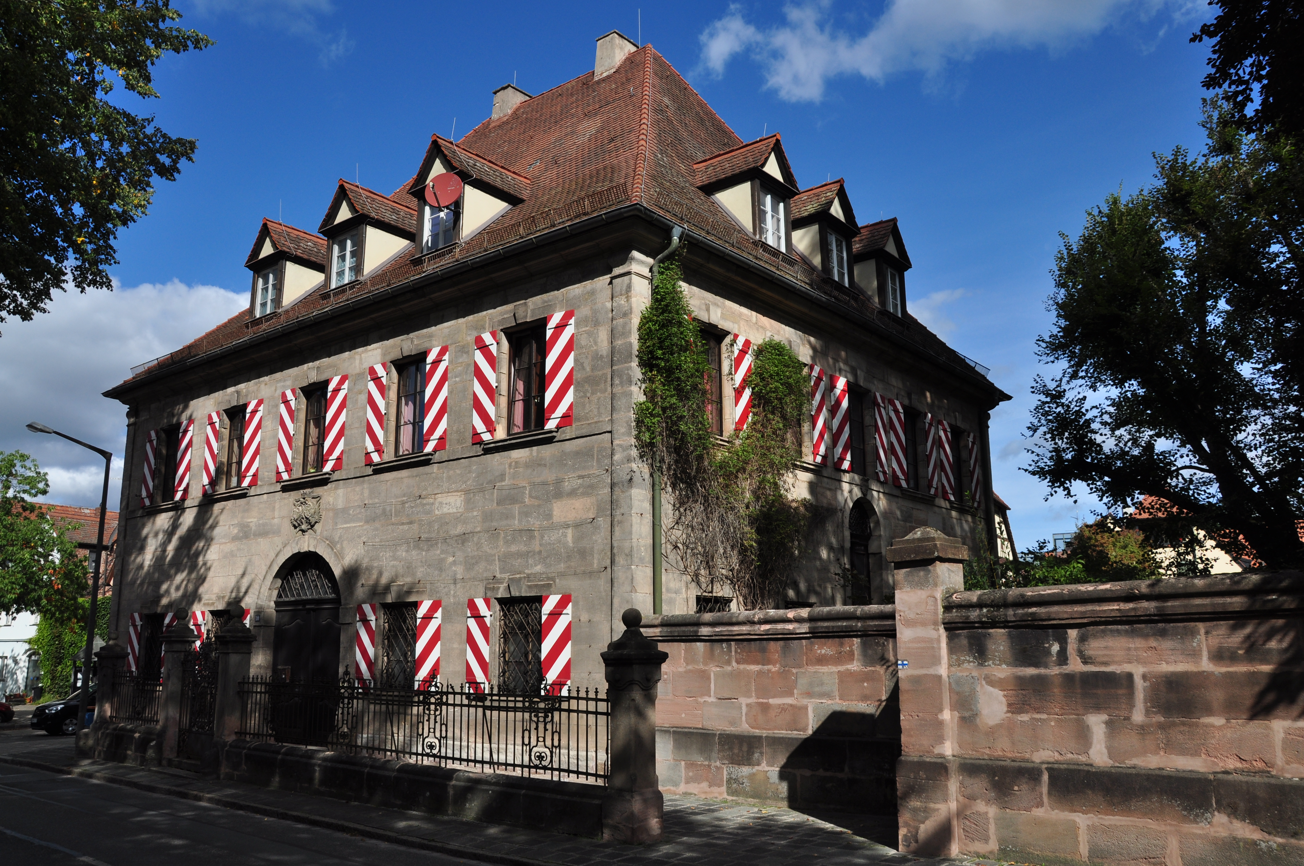 Das Hauptgebäude des Harsdorf’sches Schlosses an der Fischbacher Hauptstr. 199This is a photograph of an architectural monument.